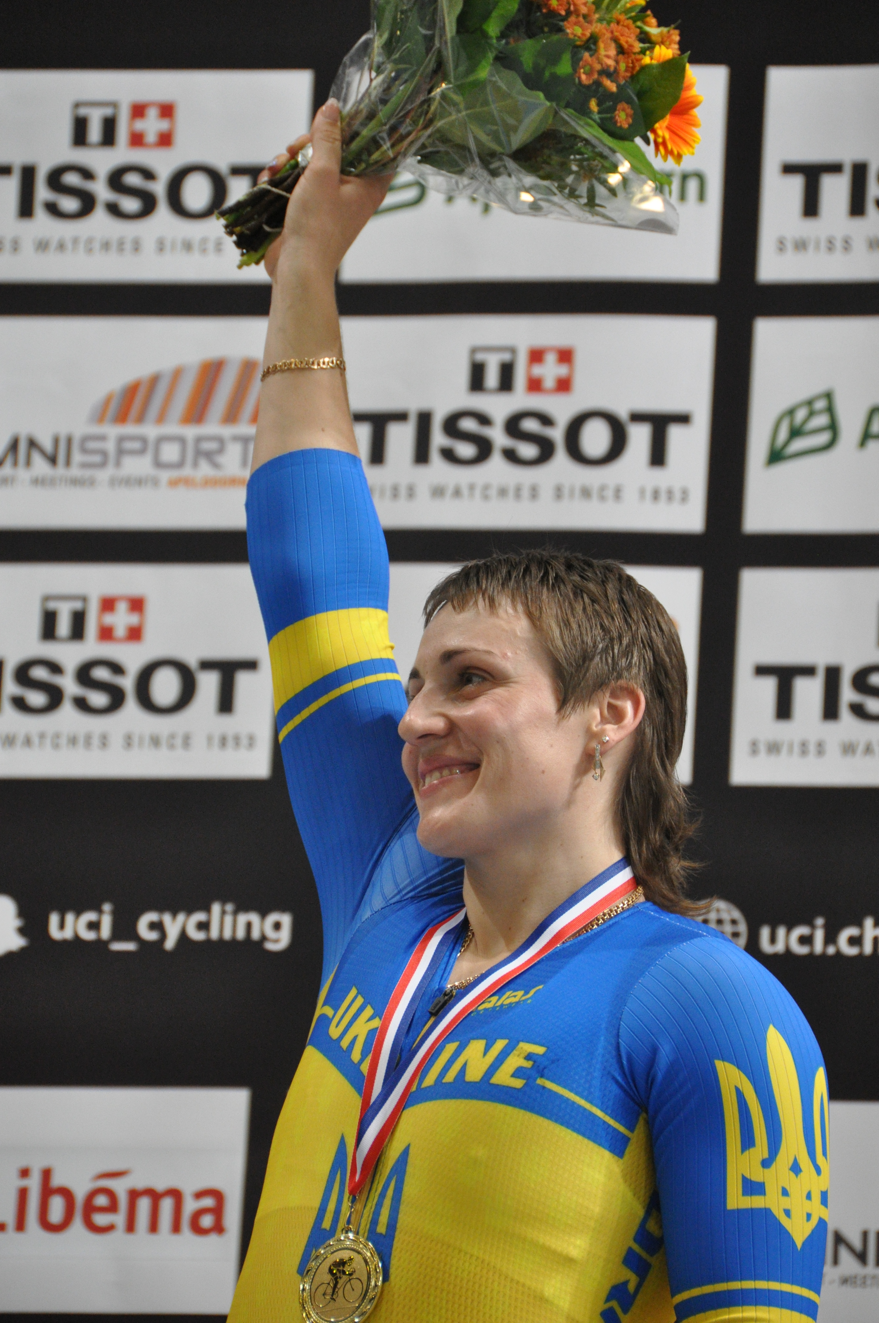 Ljubow Bassowa, ukrainische Radsportlerin: Gold im Keirin